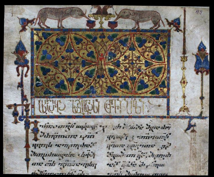 Motsameta Gospel